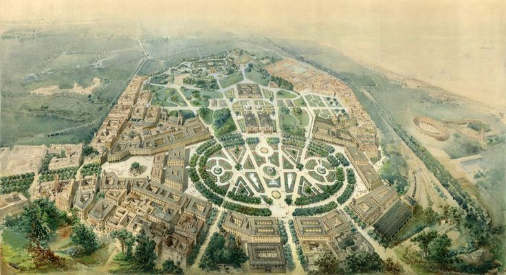 Proyecto de parque de la Ciudadela de Carlo Macciachini (1872).